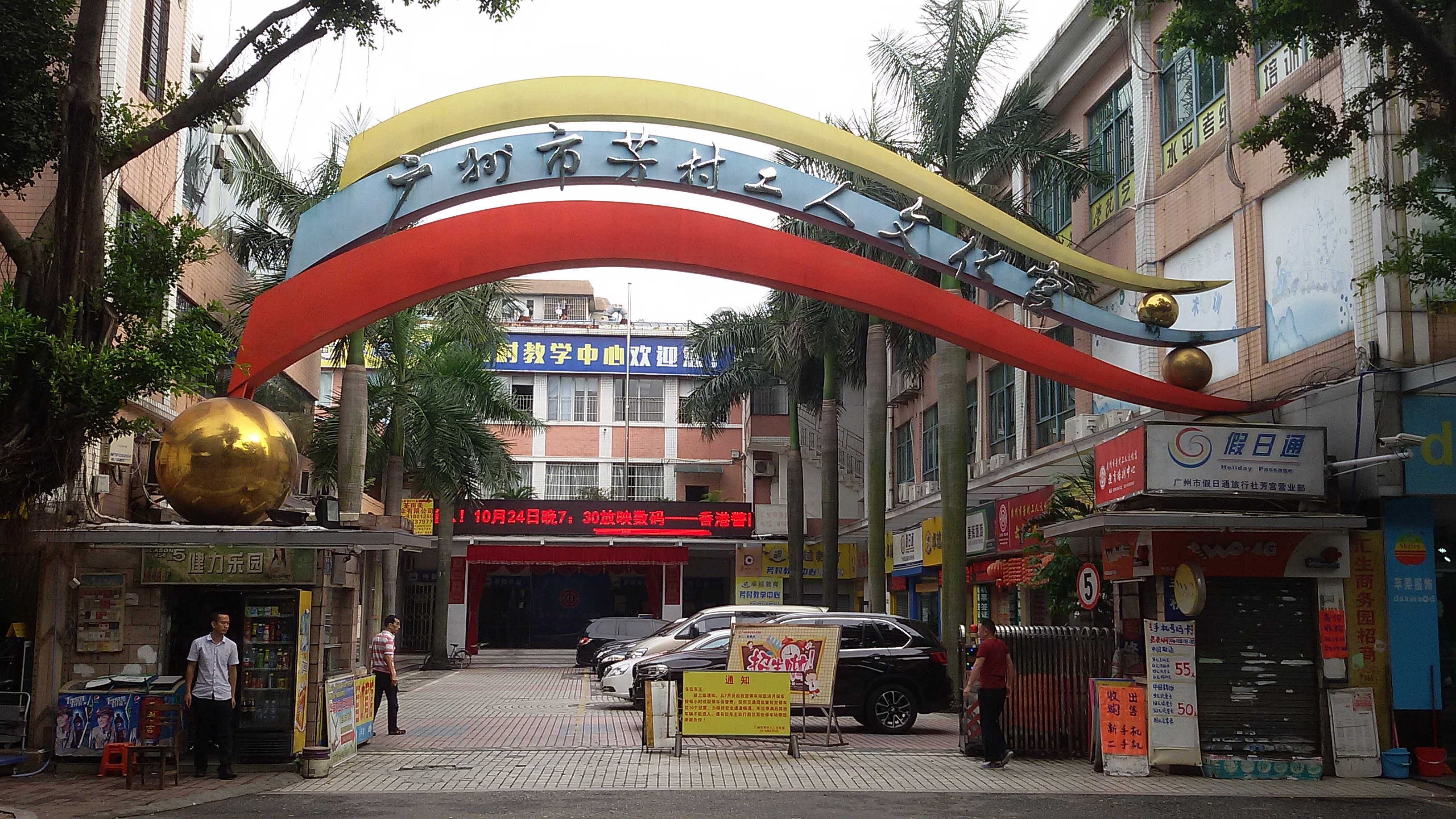 粵語: 芳村工人文化宫